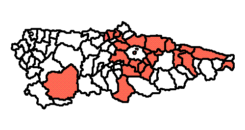 Mapa de agrupaciones locales.